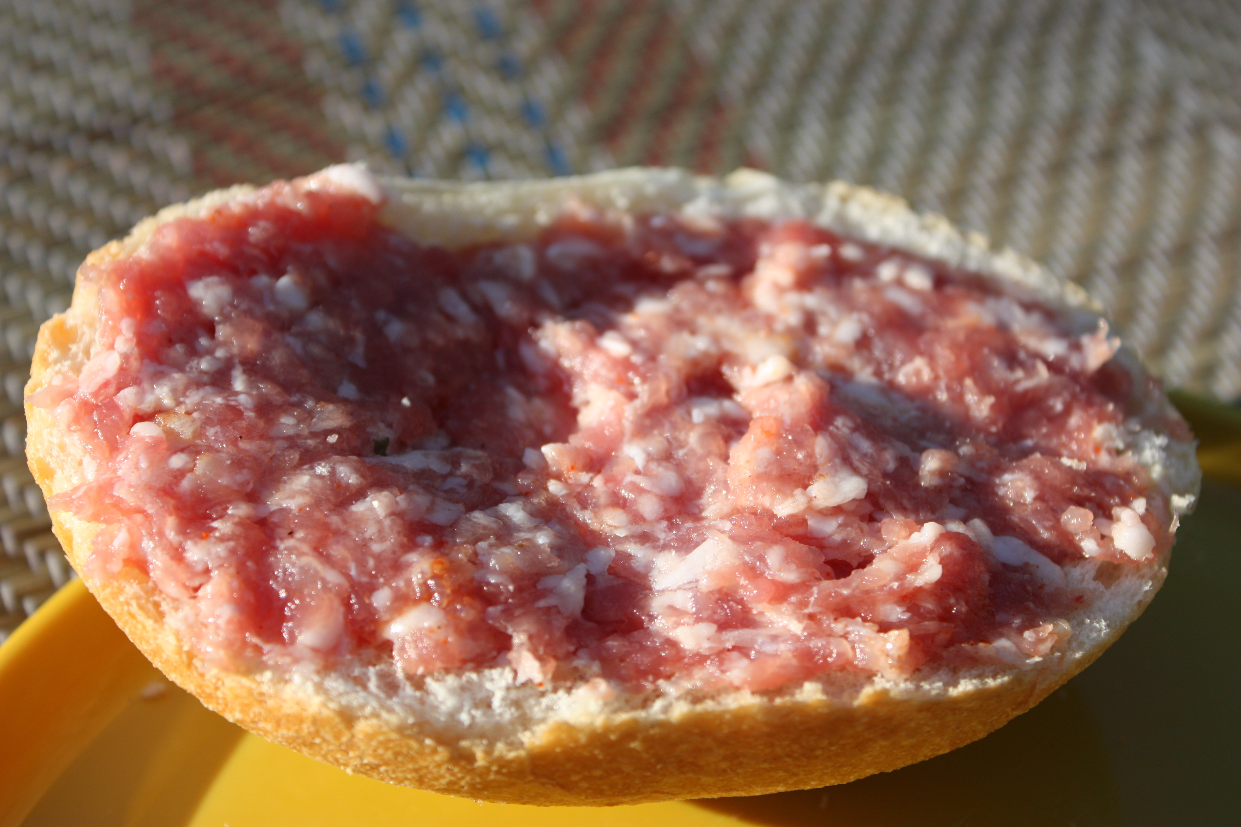 Mettbrötchen